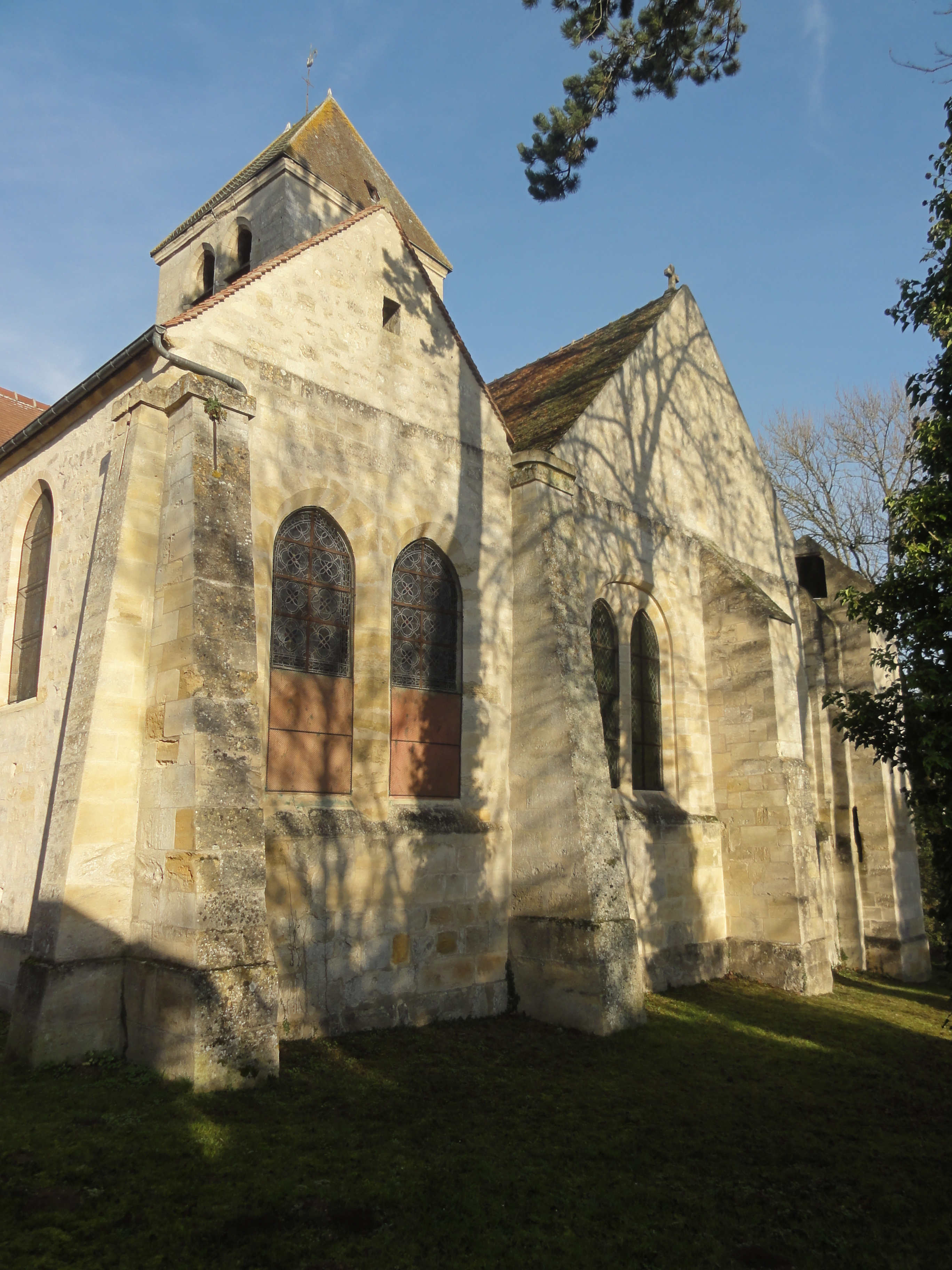 Chevet, vue depuis le sud-est.